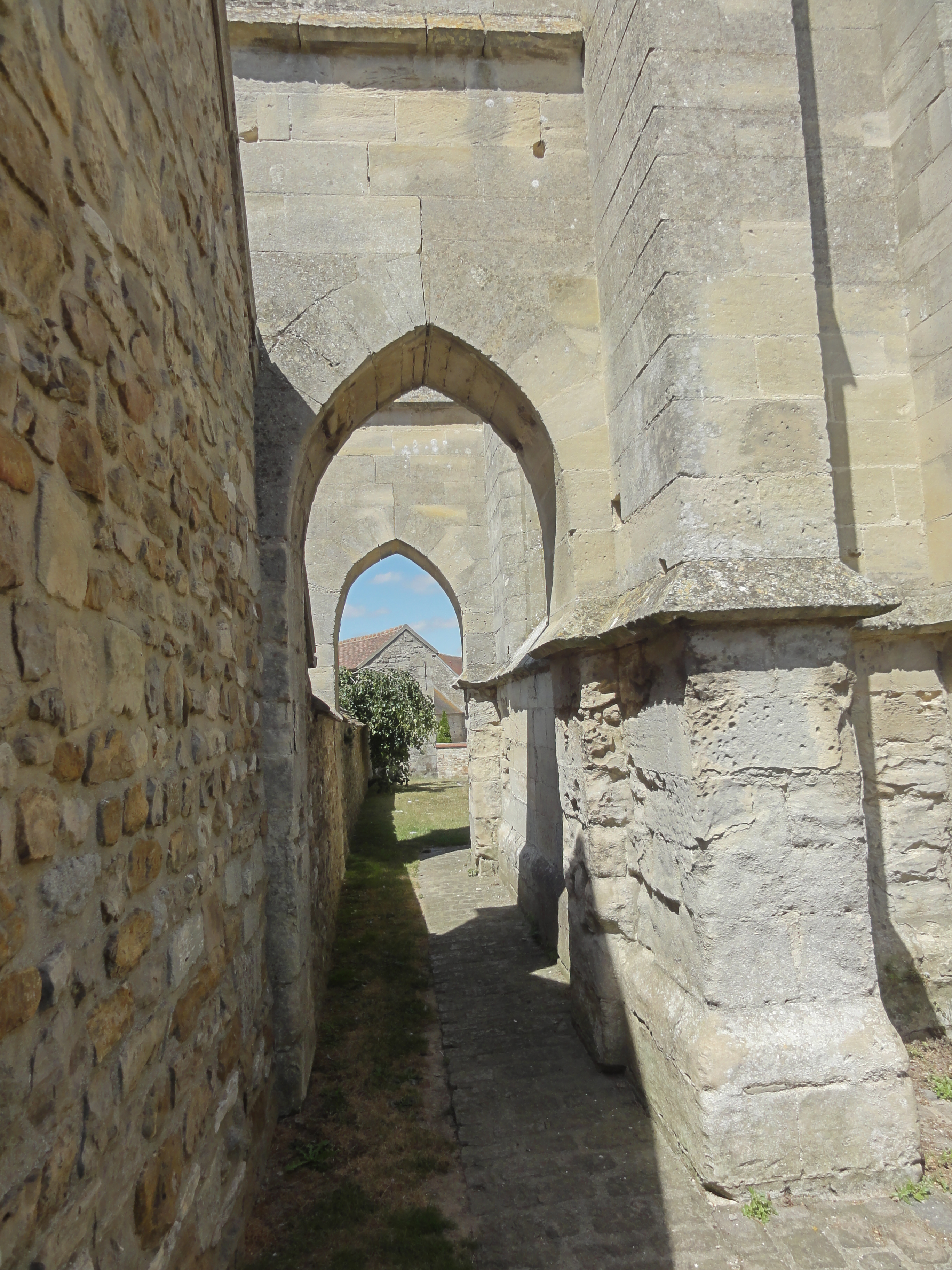 Église Sainte-Marie-Madeleine du Bellay-en-Vexin (voir titre).